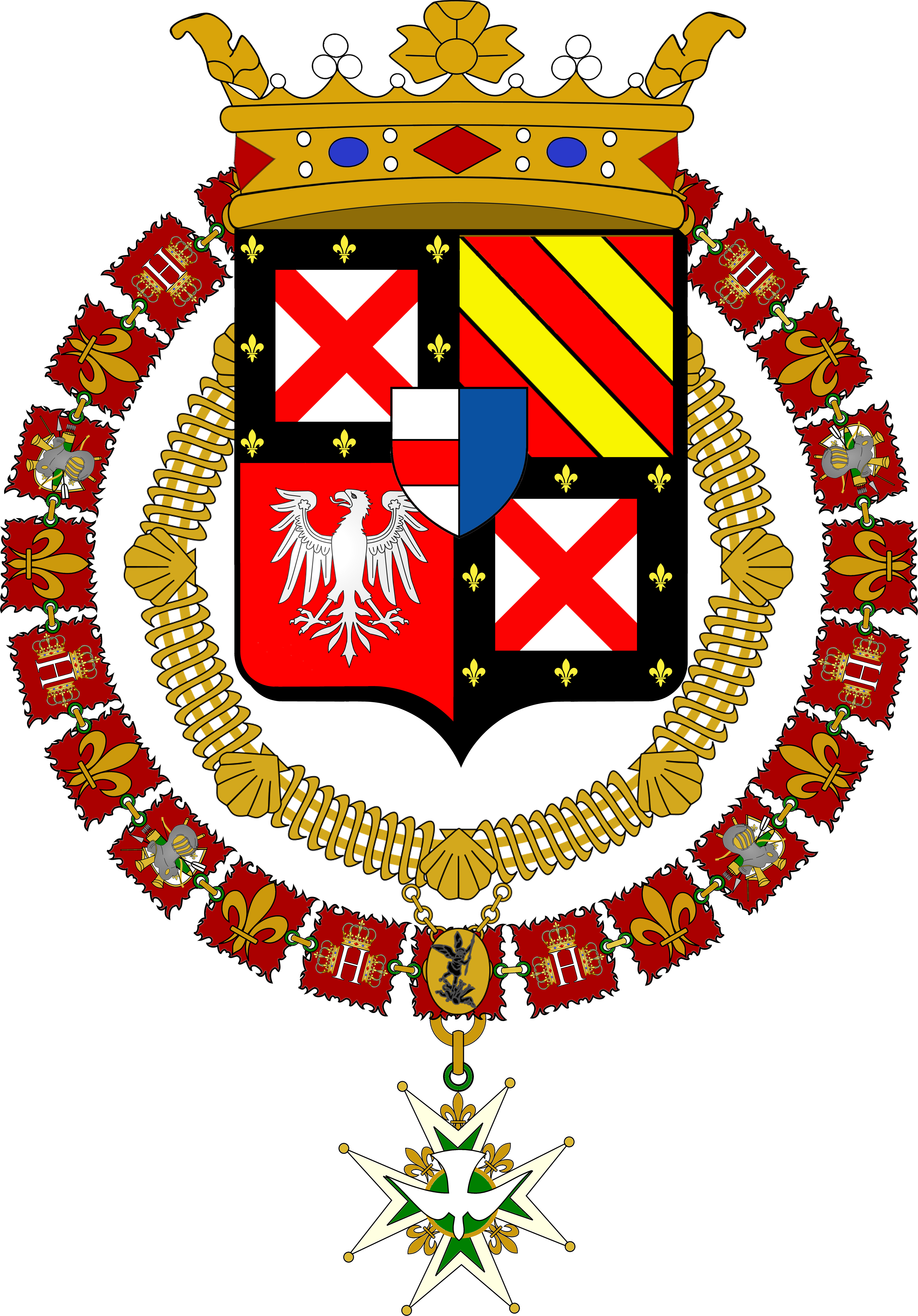 Armorial Melchior Mitte de Chevrières, Marquis de Saint-Chamond, de Miolans, de Montpezat.